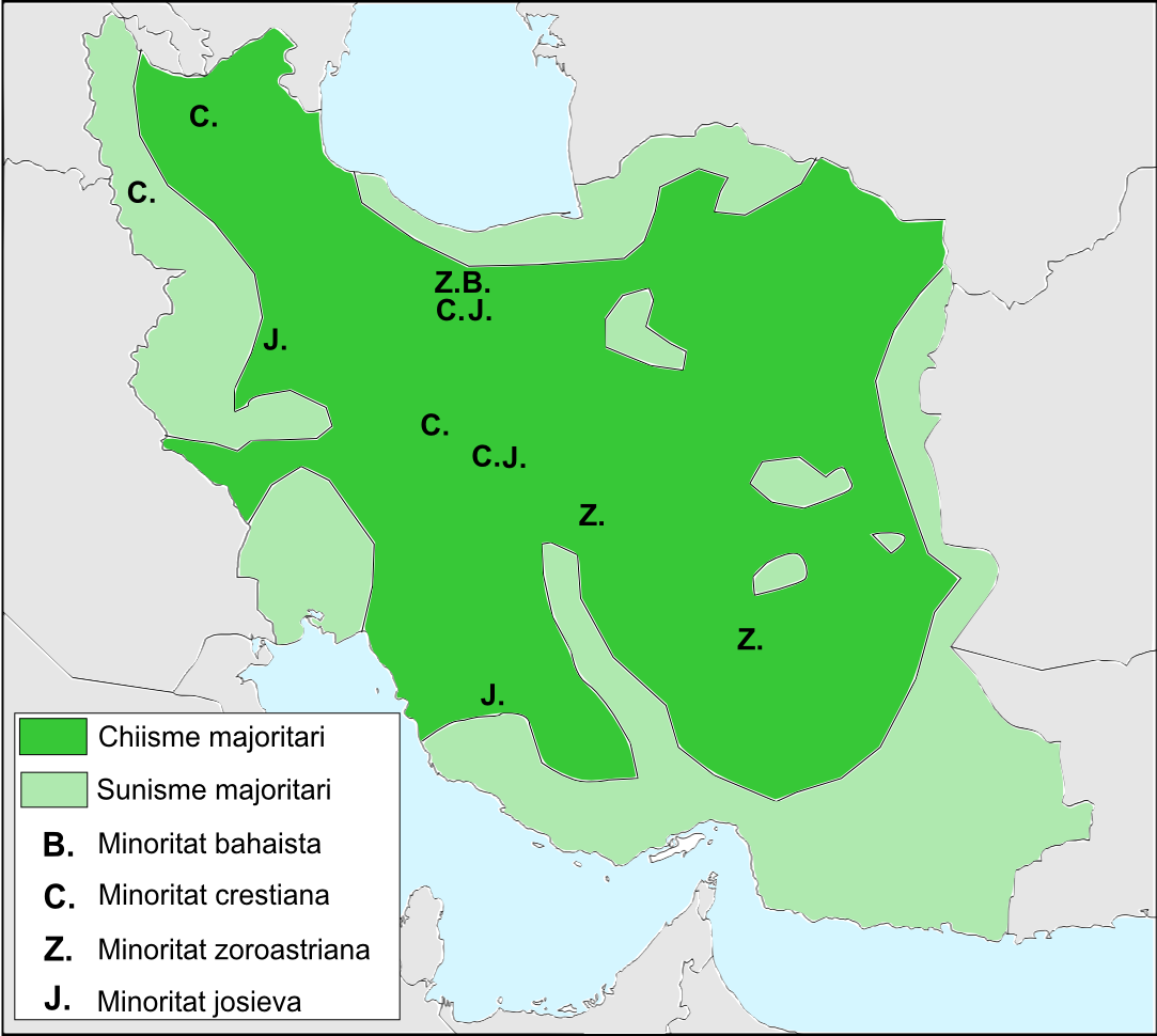 Religions en Iran.